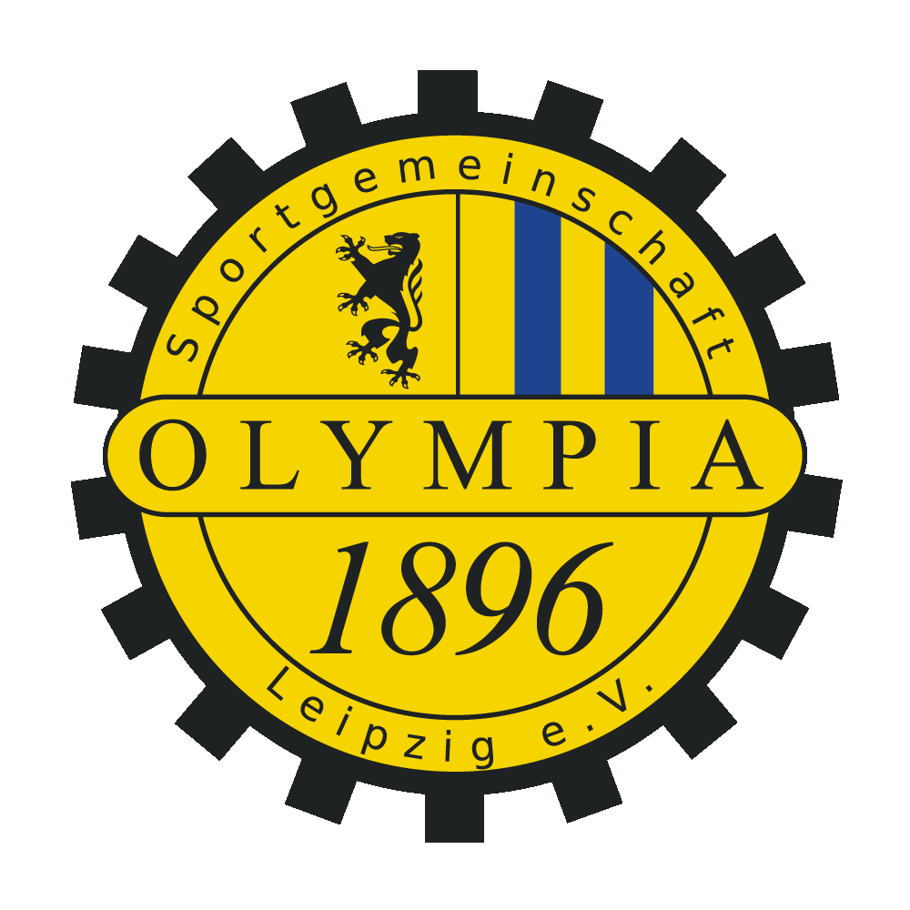 Aktuelles Logo der SG Olympia 1896 Leipzig e.V.